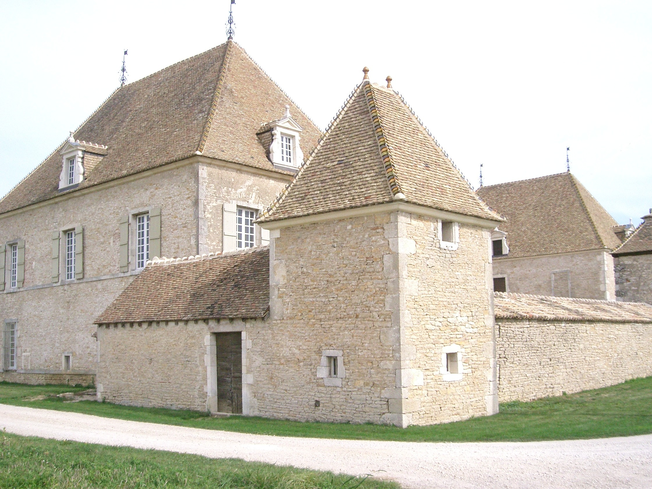 petit château de Massé commune de Corcelles-les-Arts en Côte d'or, France (XVIIe siècle)